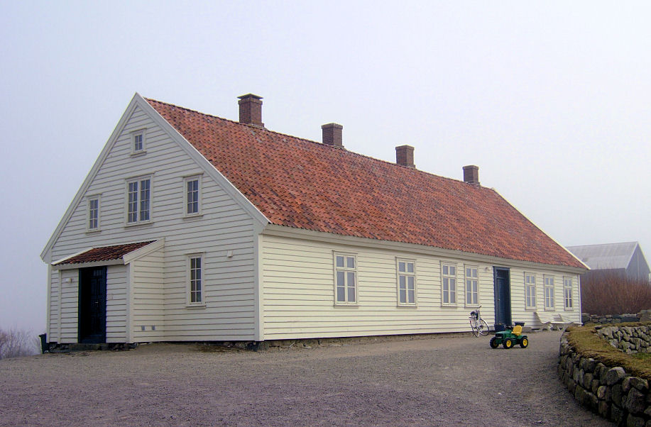 Hå gamle prestegard, Hå Norway